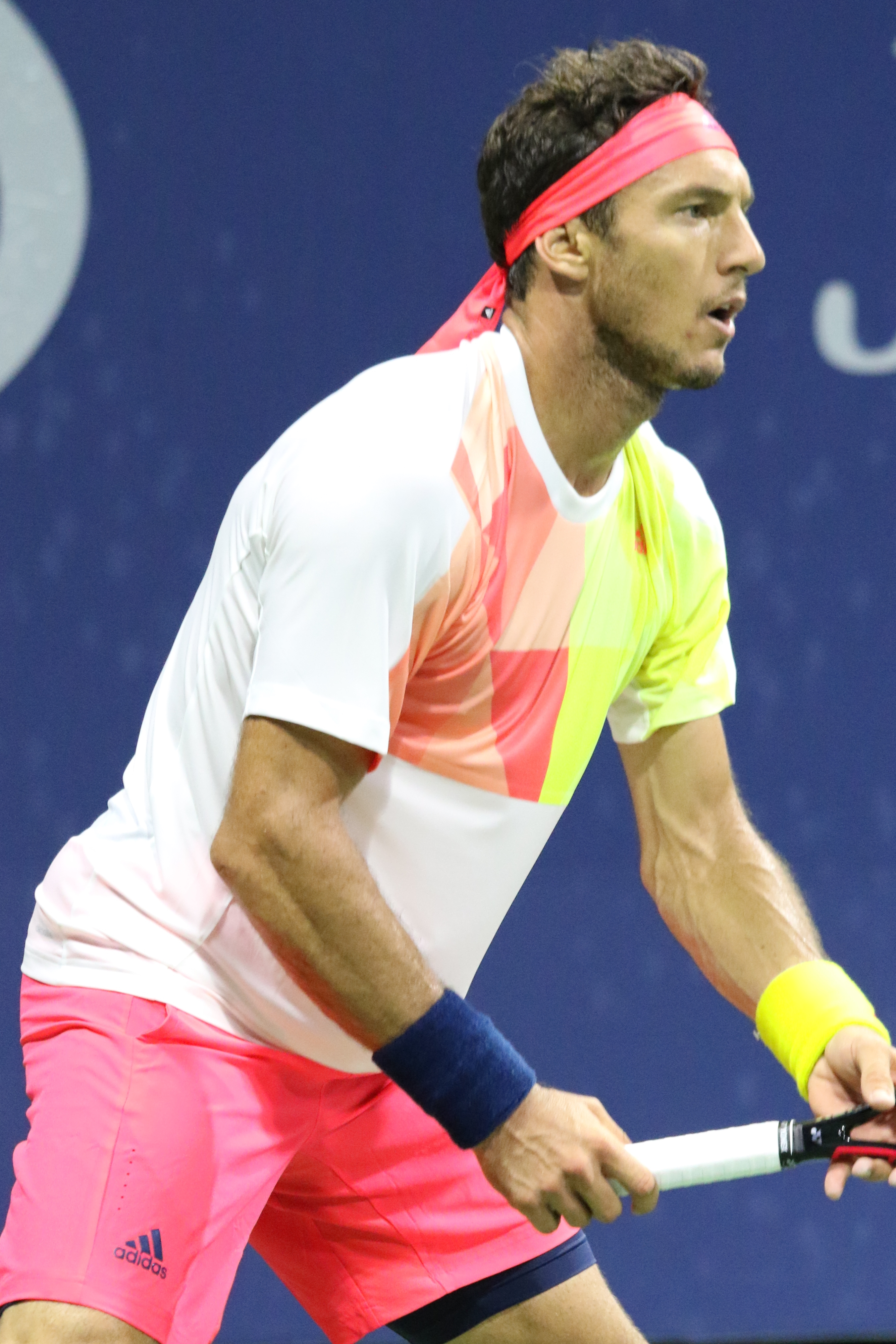 Monaco US16 (15)